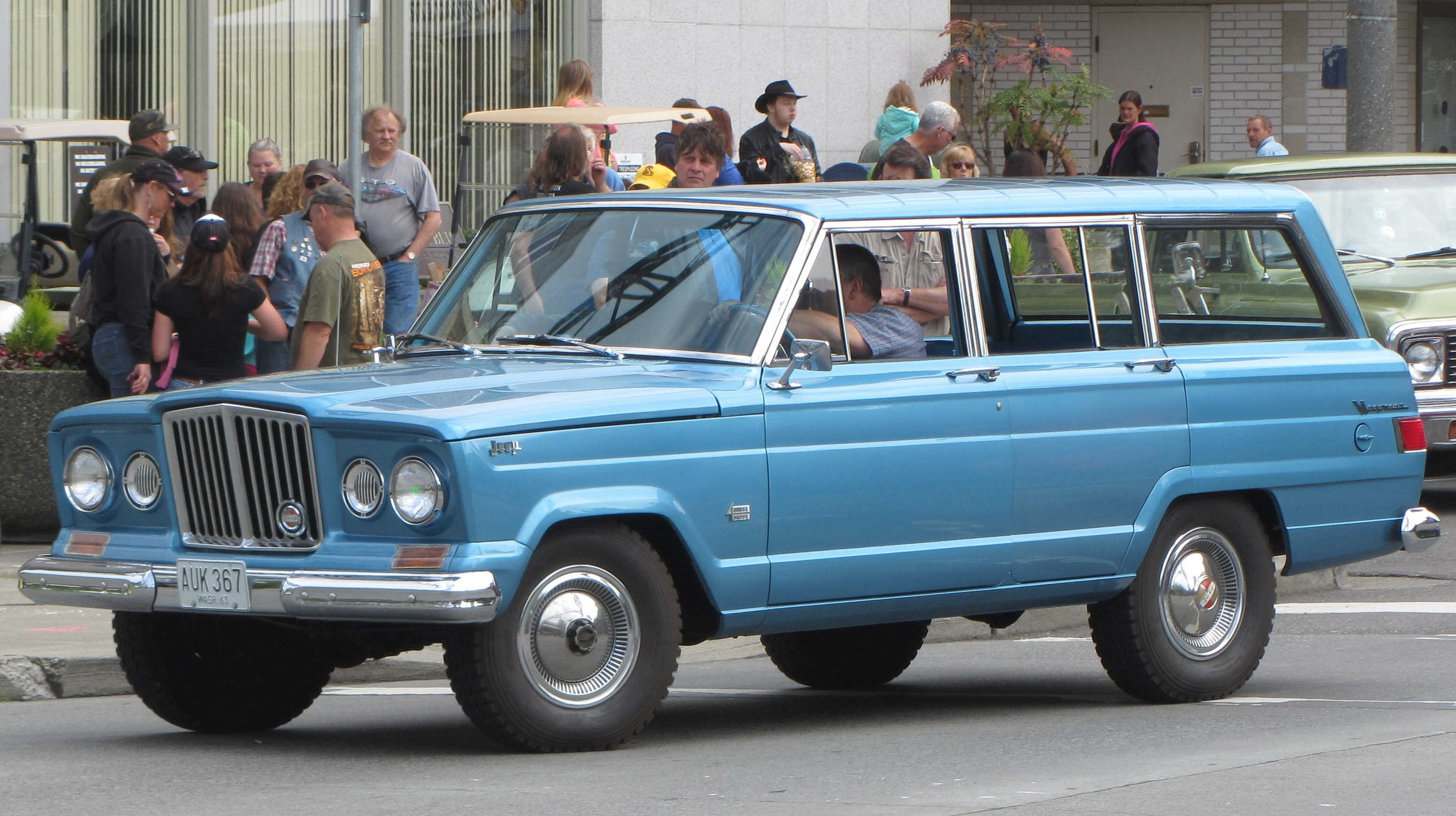 1963-64 Kaiser Jeep Wagoneer